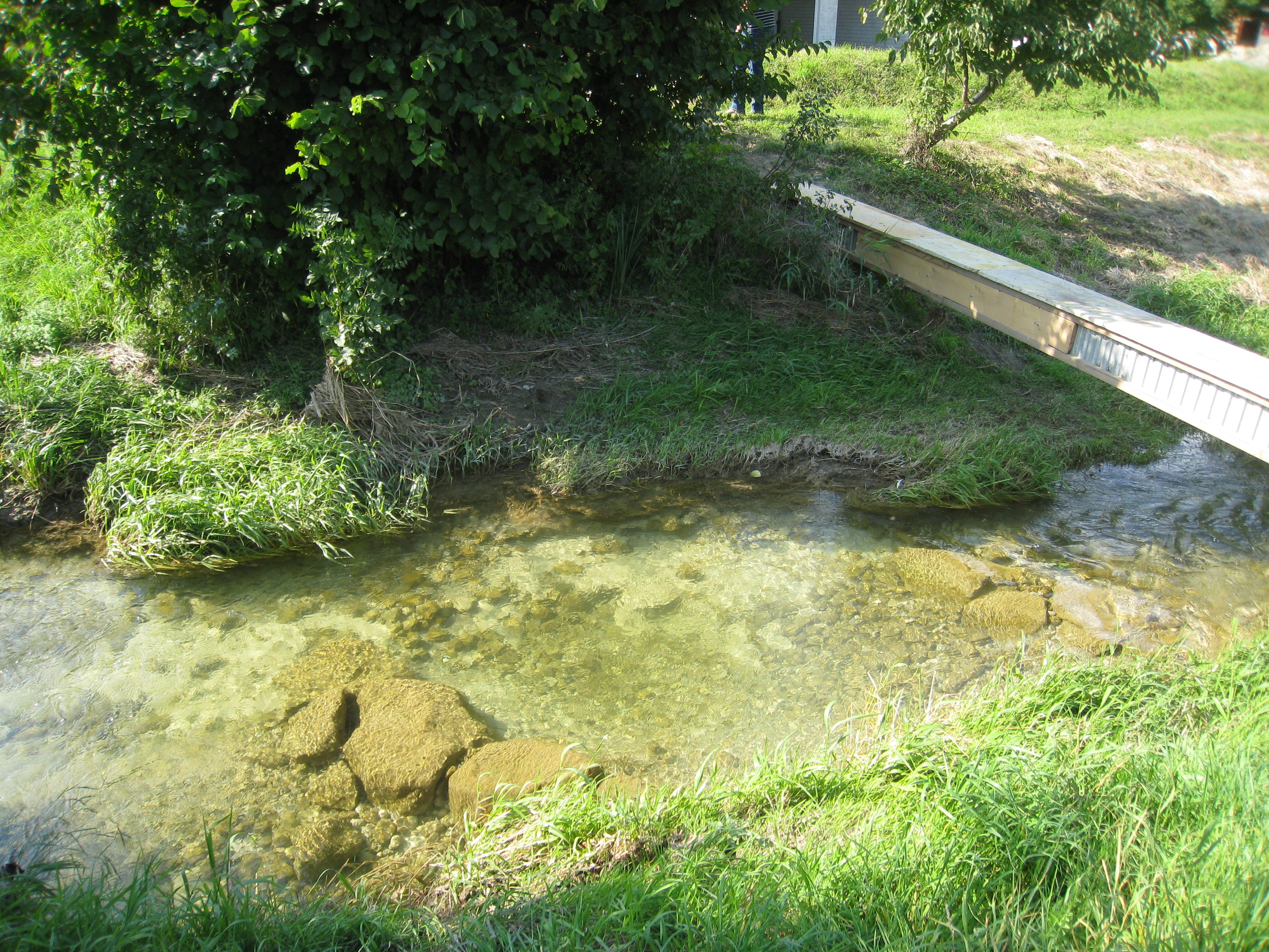 Uferschutz mit Lenkbuhnen am Ellikerbach / Kanton Zürich: Ufererosion gegenüber der zu schützenden Straßenböschung